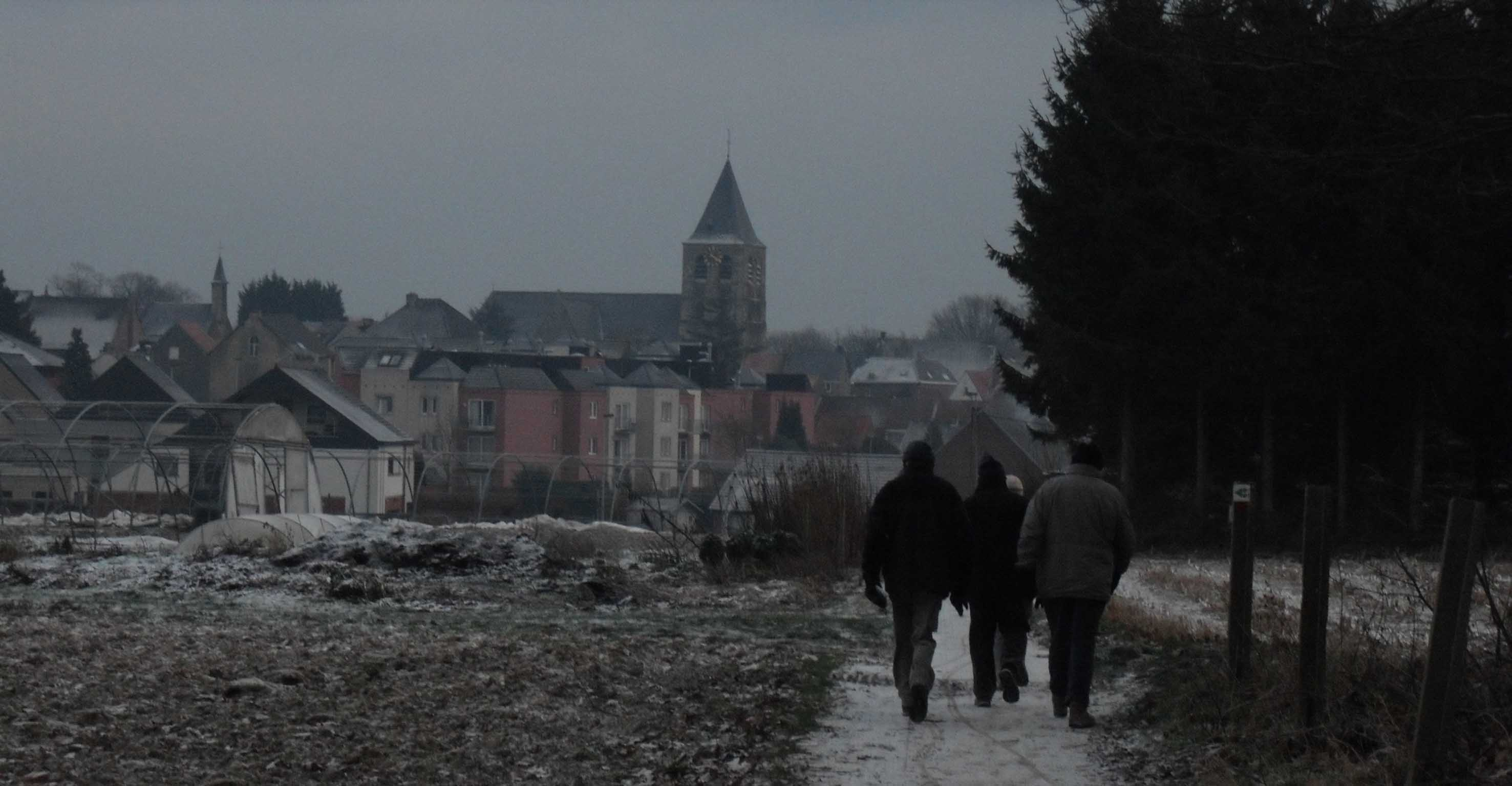 Winters beeld van Moorsel in dec. 2009 - Aalst - Oost-Vlaanderen - Vlaanderen - België